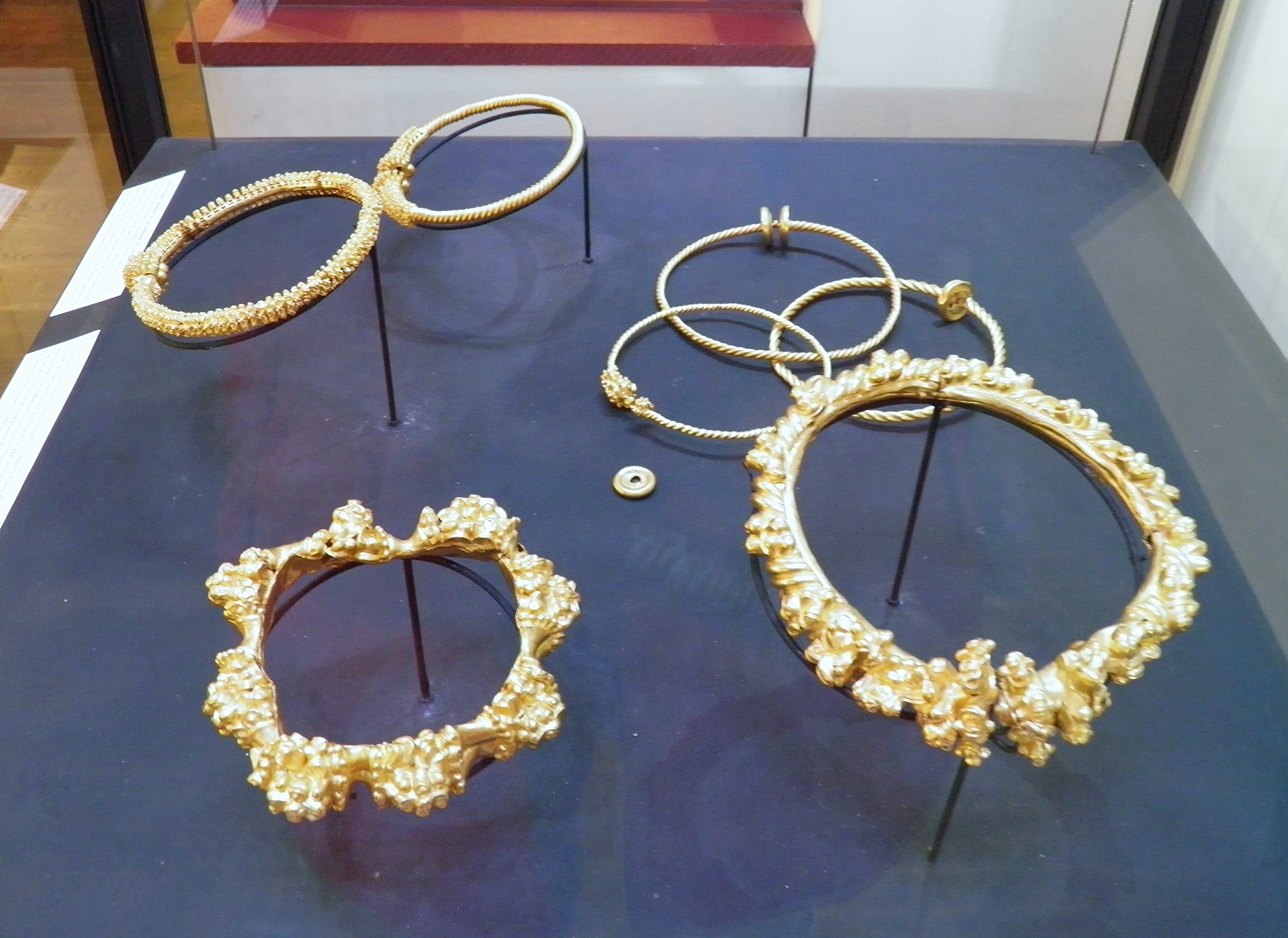 Cinq torques gaulois, IIIe avant J.-C., MSR, Musée Saint-Raymond